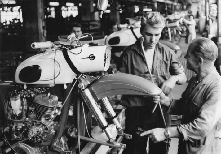 Motorradwerk Zschopau, schwedische Oberschüler Zentralbild Gahlbeck AV v.3.8.64-3.8.1964 Schwedische Oberschüler weilen gegenwärtig zu einem sechswöchigen Deutschpraktikum im Motorradwerk Zschopau. Meister Walther Leichsenring (rechts) gibt Jören Gustaffson gern einige Tips, denn die 10 schwedischen Gäste haben Gelegenheit, selbst beim Bau der Motorräder mitzuhelfen.